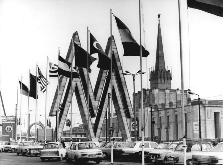 Leipzig, Frühjahrsmesse, Eingang, Parkplatz ADN-ZB Sindermann 10.3.1974-ho-Leipzig: Frühjahrsmesse 1974 eröffnet-Auf der Leipziger Frühjahrsmesse 1974, die heute (10.3.74) ihre Tore geöffnet hat, geben 9.000 Aussteller aus 60 Ländern einen umfassenden Einblick in den Leistungsstand von Wissenschaft, Technik und Produktion. Unser Foto zeigt einen Blick auf den mit Fahnen geschmückten Eingang zum Messegelände sowie auf den sowjetischen Pavillon (rechts).